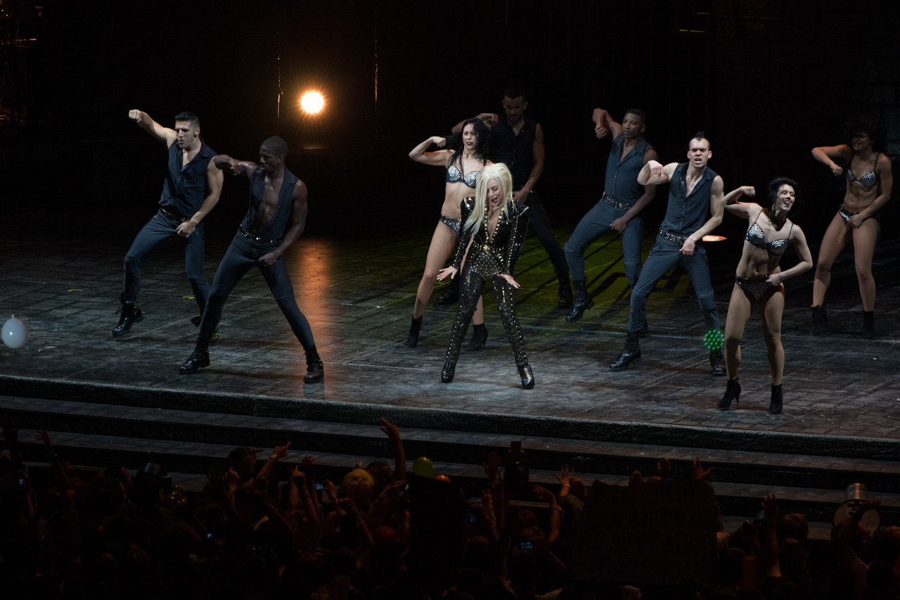 Lady Gaga cantando 'Bad Kids' en su gira The Born This Way Ball, en Milán, Italia.